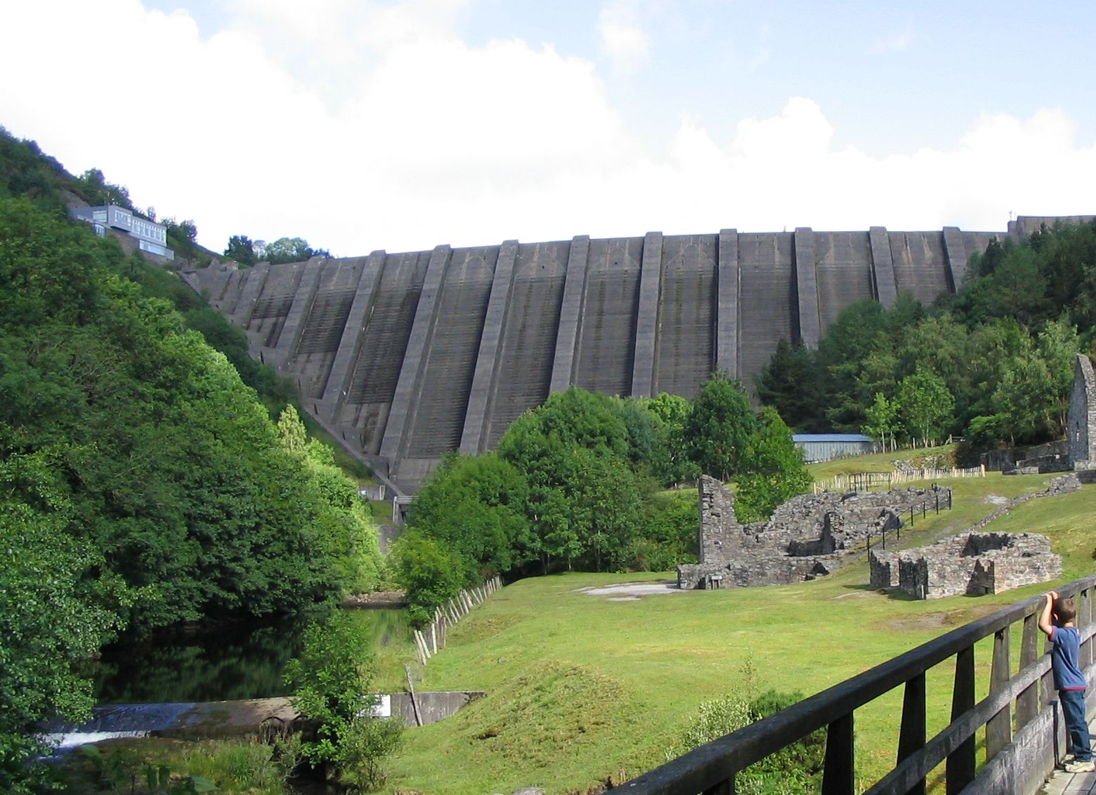 Clywedog reservoir